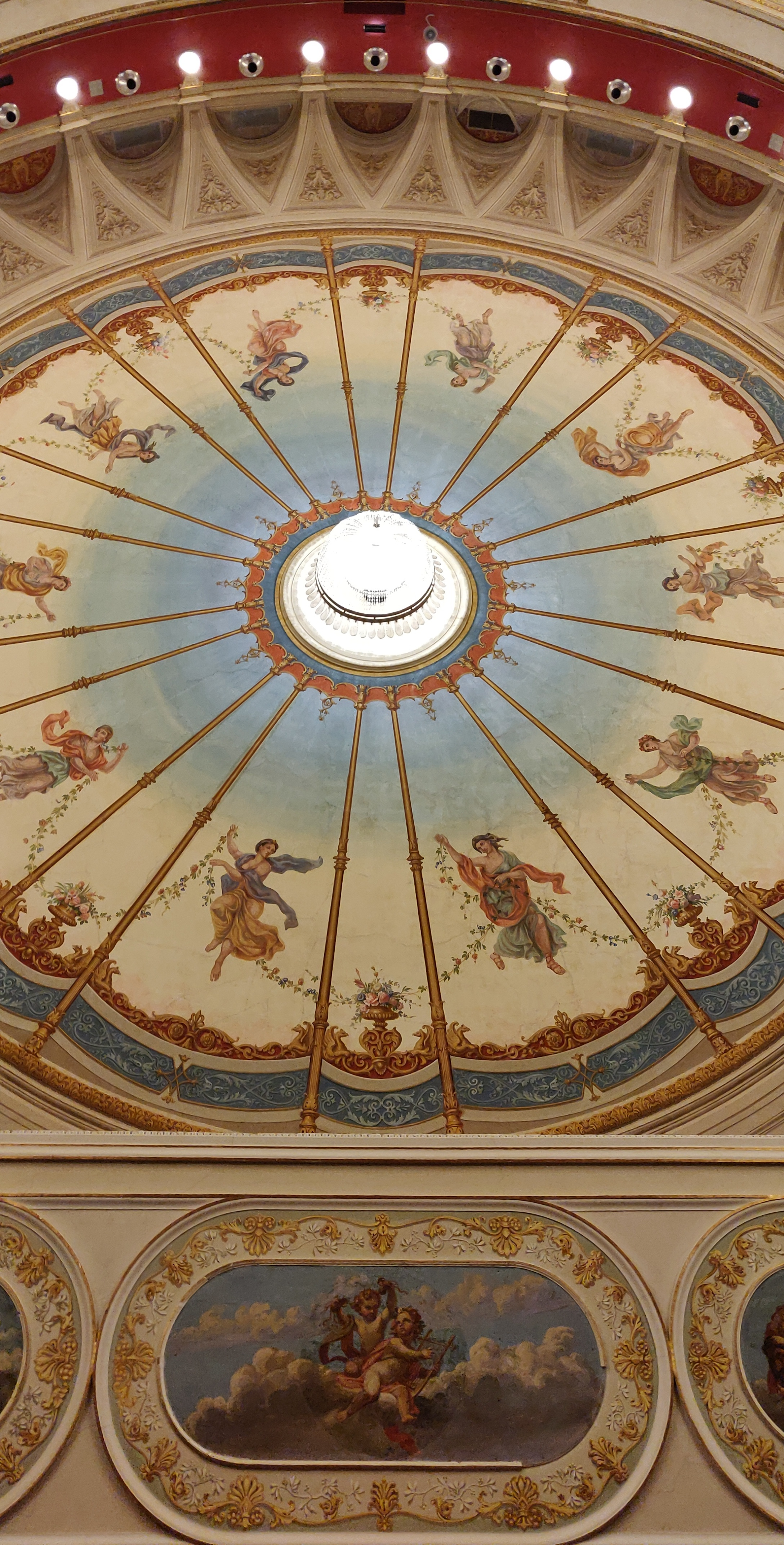 Lampadario